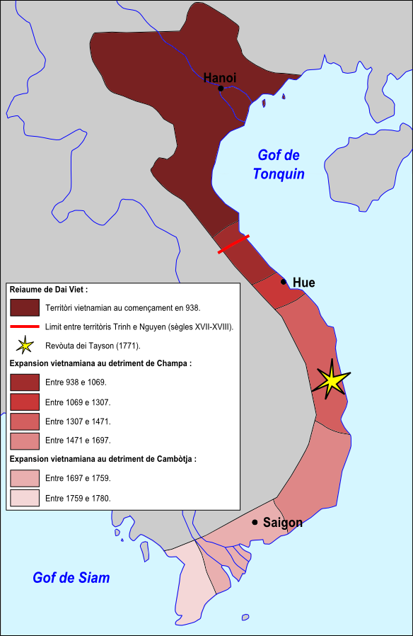 Expansion vietnamiana entre lei sègles XI e XVIII.